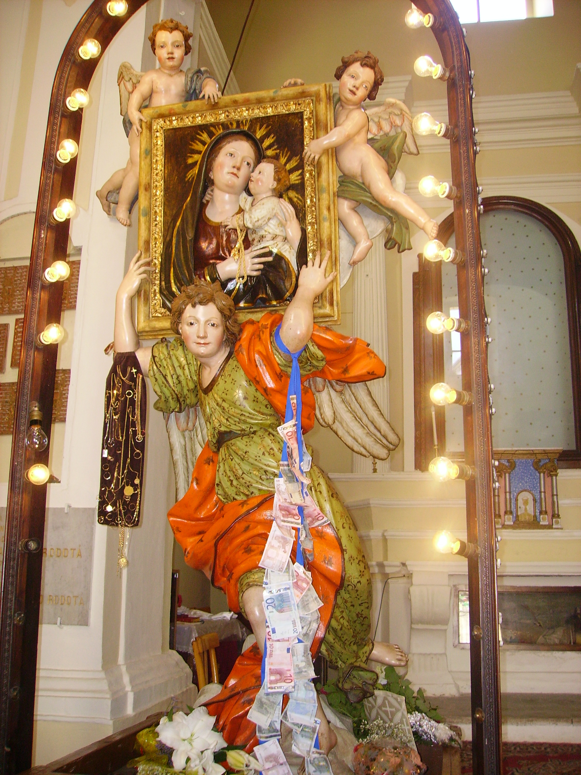 Statua lignea raffigurante la Madonna del Buon Consiglio